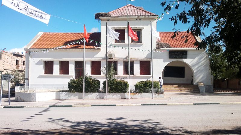 La Mairie de Mezaourou, Siège de l'APC